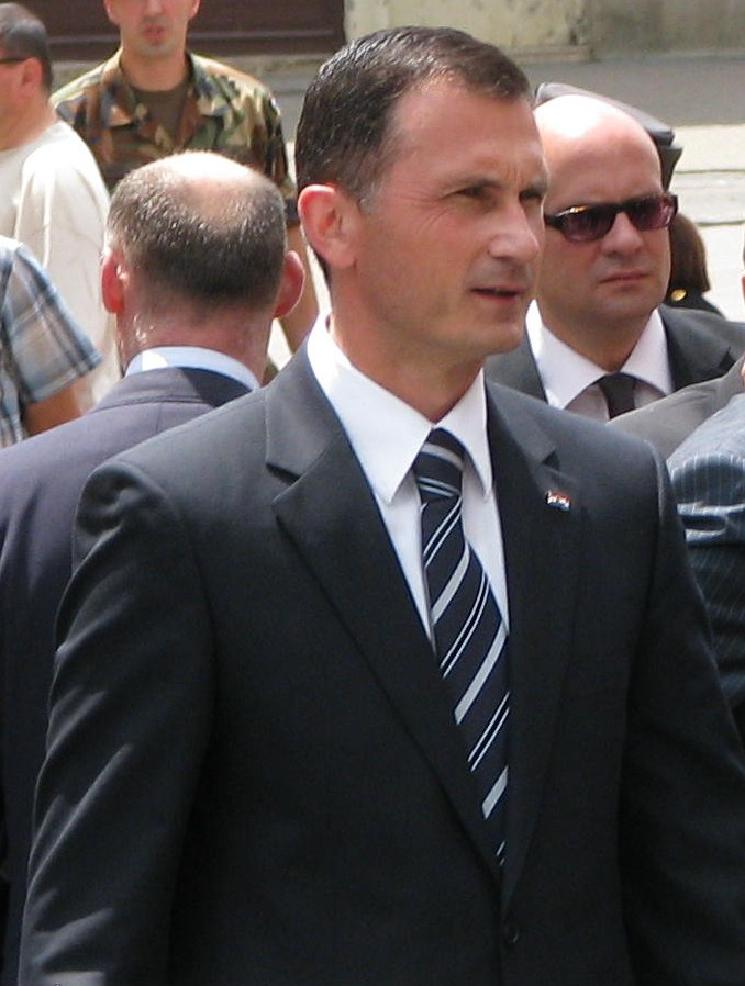 Dragan Primorac